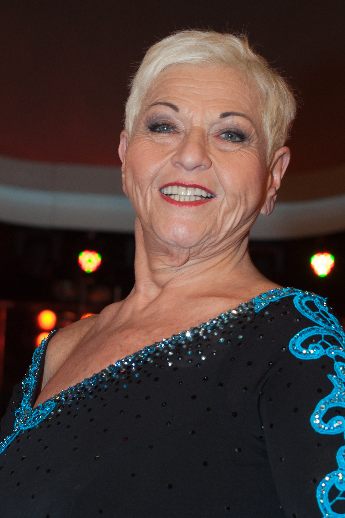 ORF Dancing Stars - Die fünfte Live-Show. Bild zeigt Jazz Gitti.